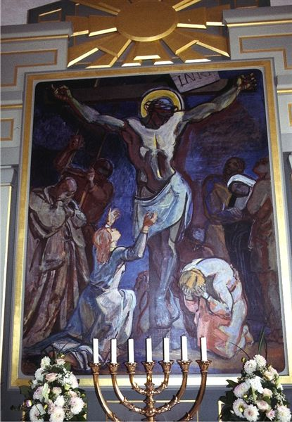 Søndersø Kirke i Danmark. Altertavle